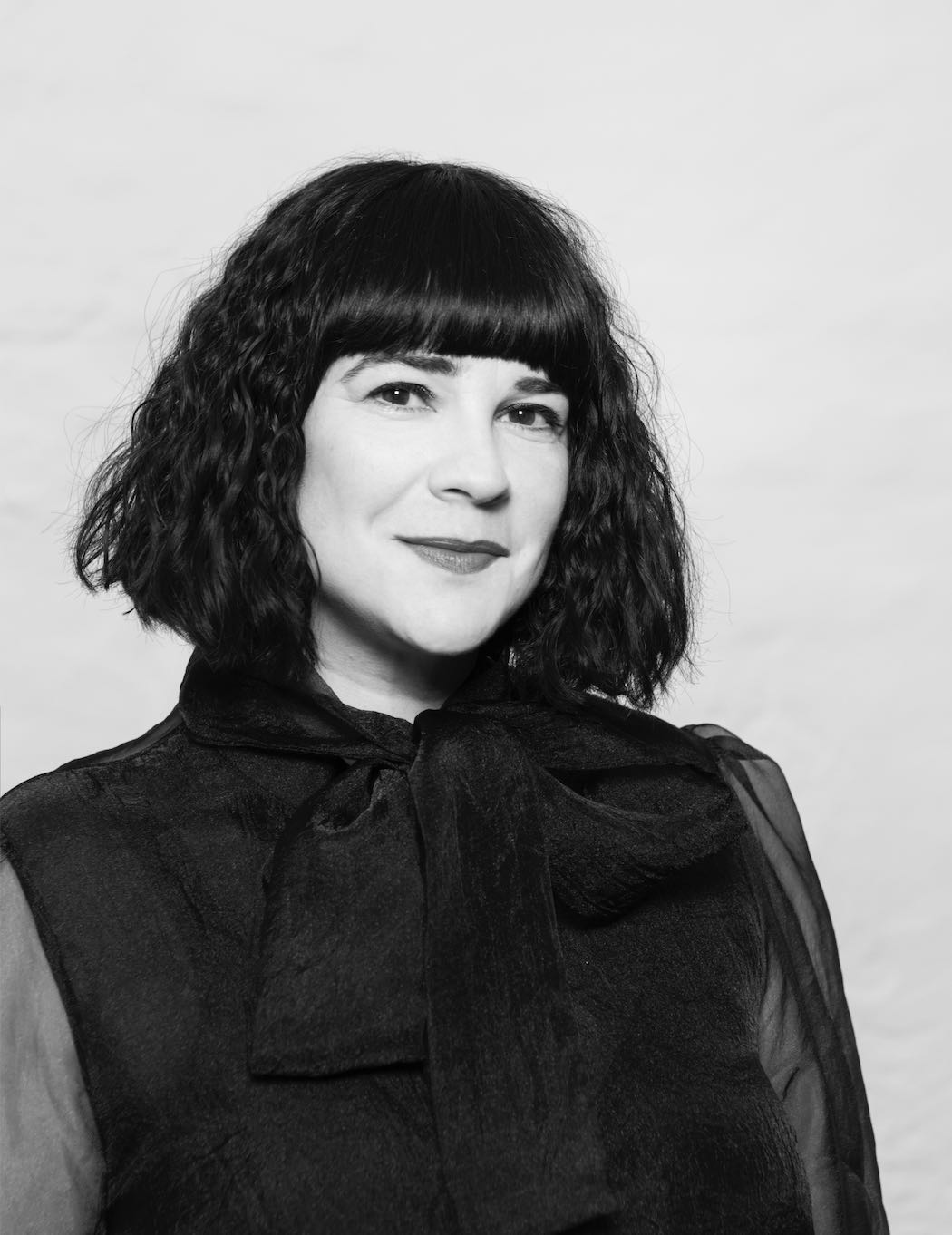 Anne Dreesbach